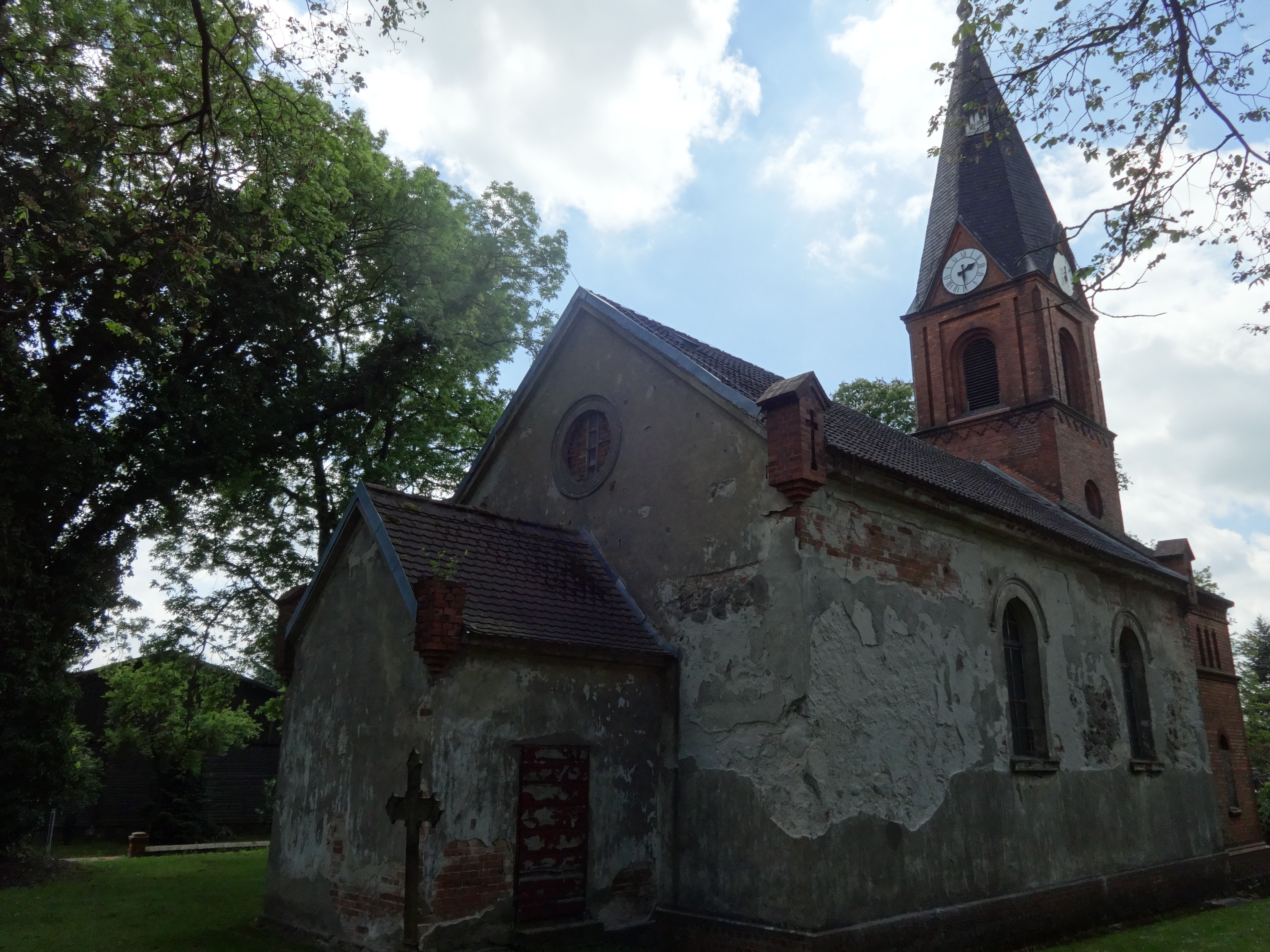 Die Dorfkirche ist ein romanisierter Backsteinbau, der vermutlich im 16. oder 17. Jahrhundert entstand. 1779 kam der Westturm hinzu; 1905 erfolgte eine Sanierung des Bauwerks. Im Innern befindet sich unter anderem eine Sauer-Orgel.